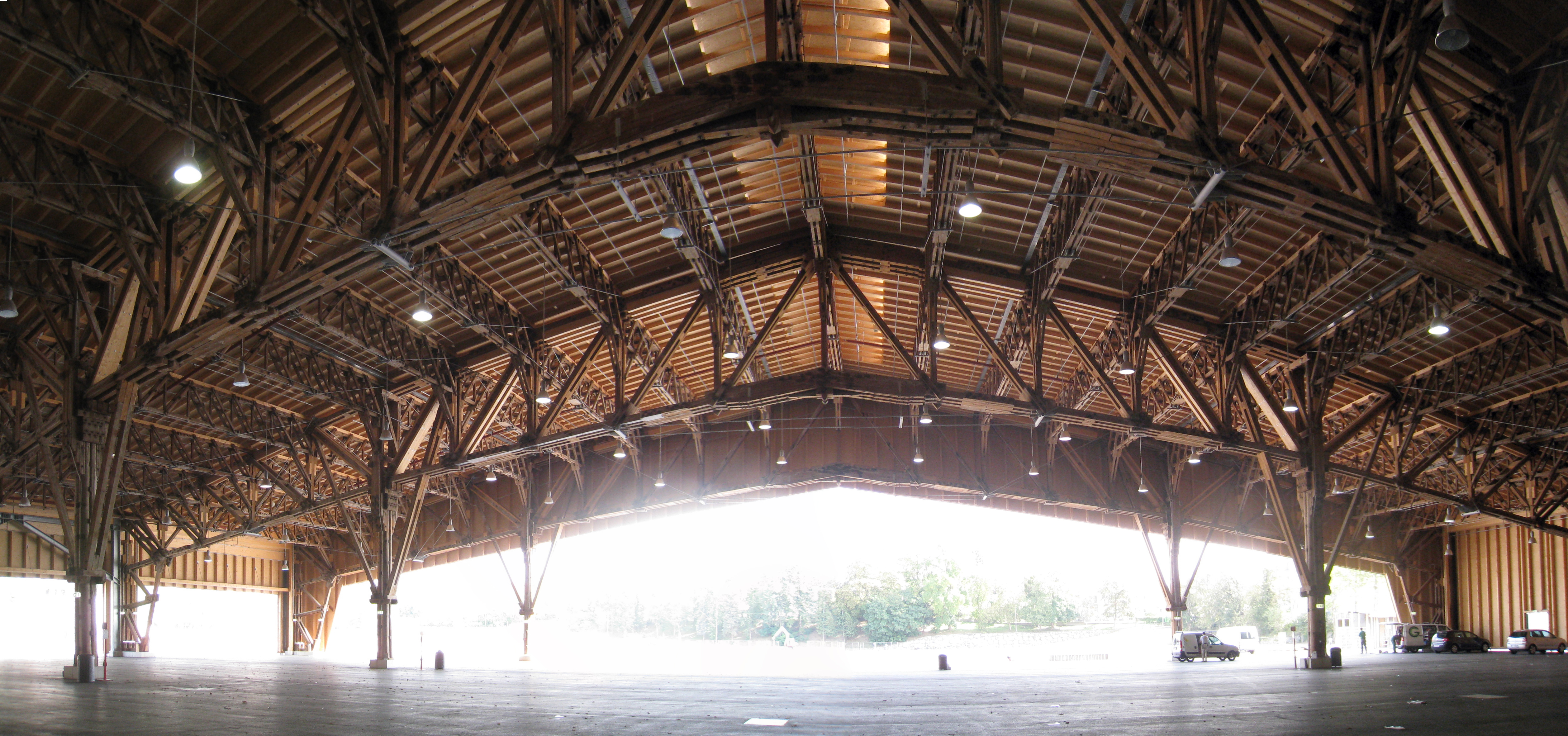 Halle B der Grazer Messe, ehem. Volkskundgebungshalle